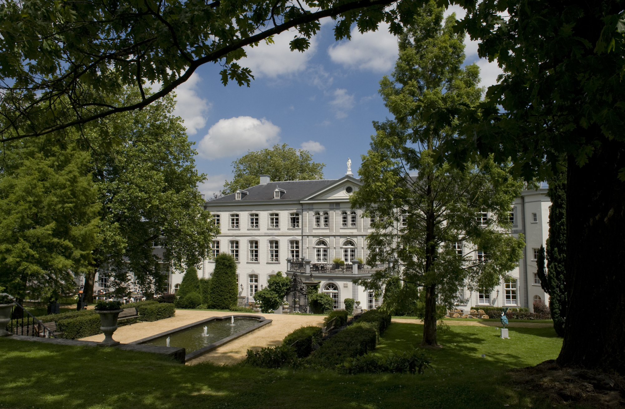 Achterzijde & park Hotel Kasteel Bloemendal